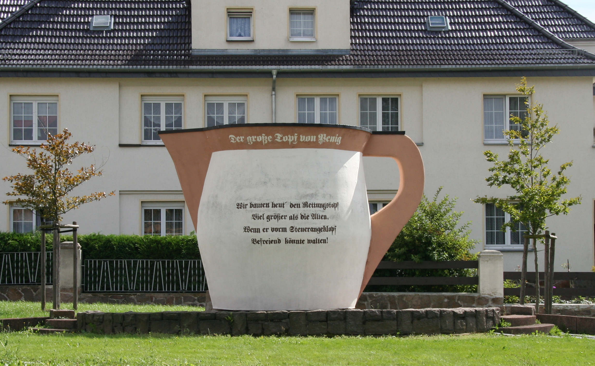 Der große Topf von Penig